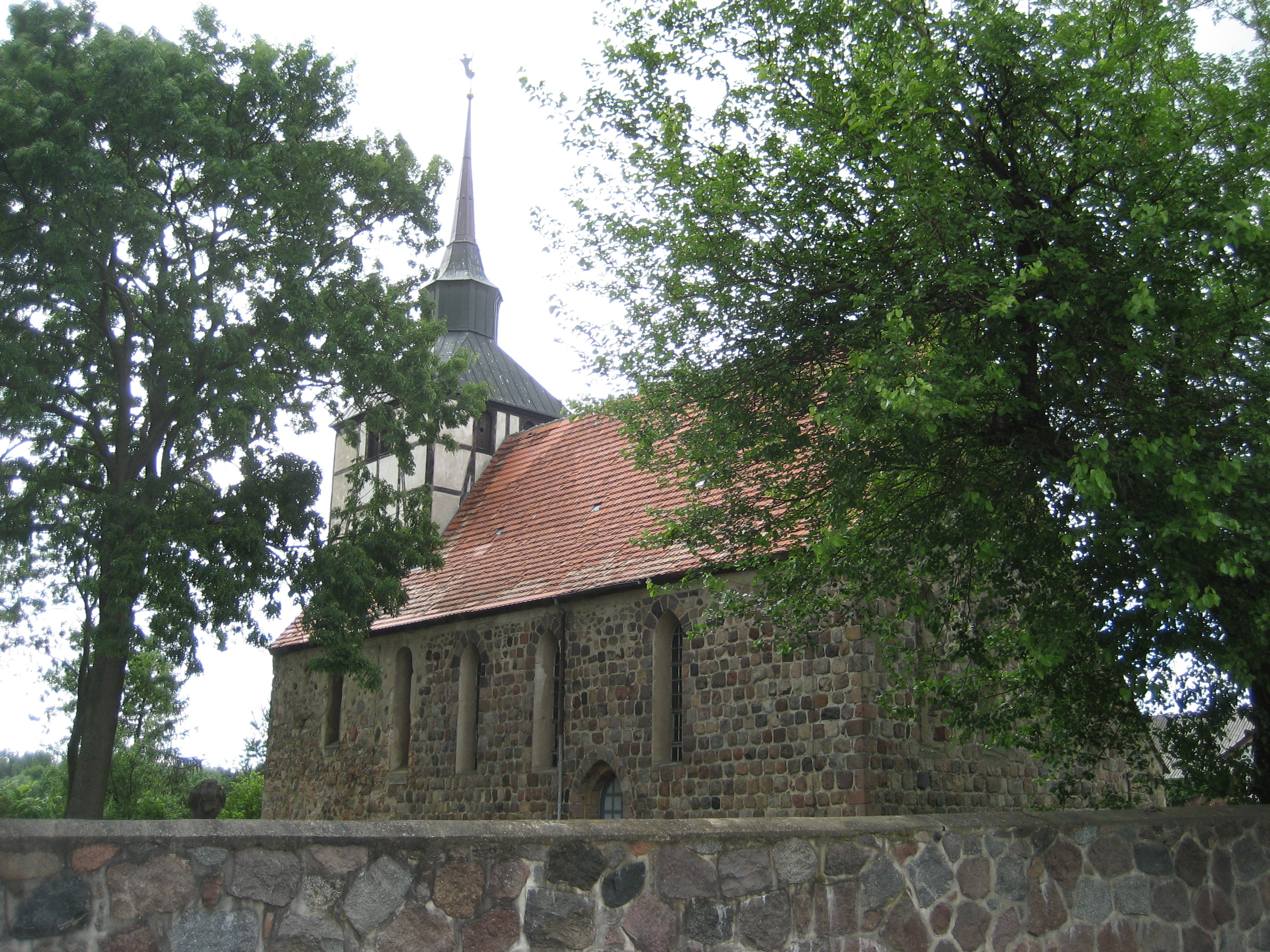 Kirche Grambow aus Blickrichtung Südosten.